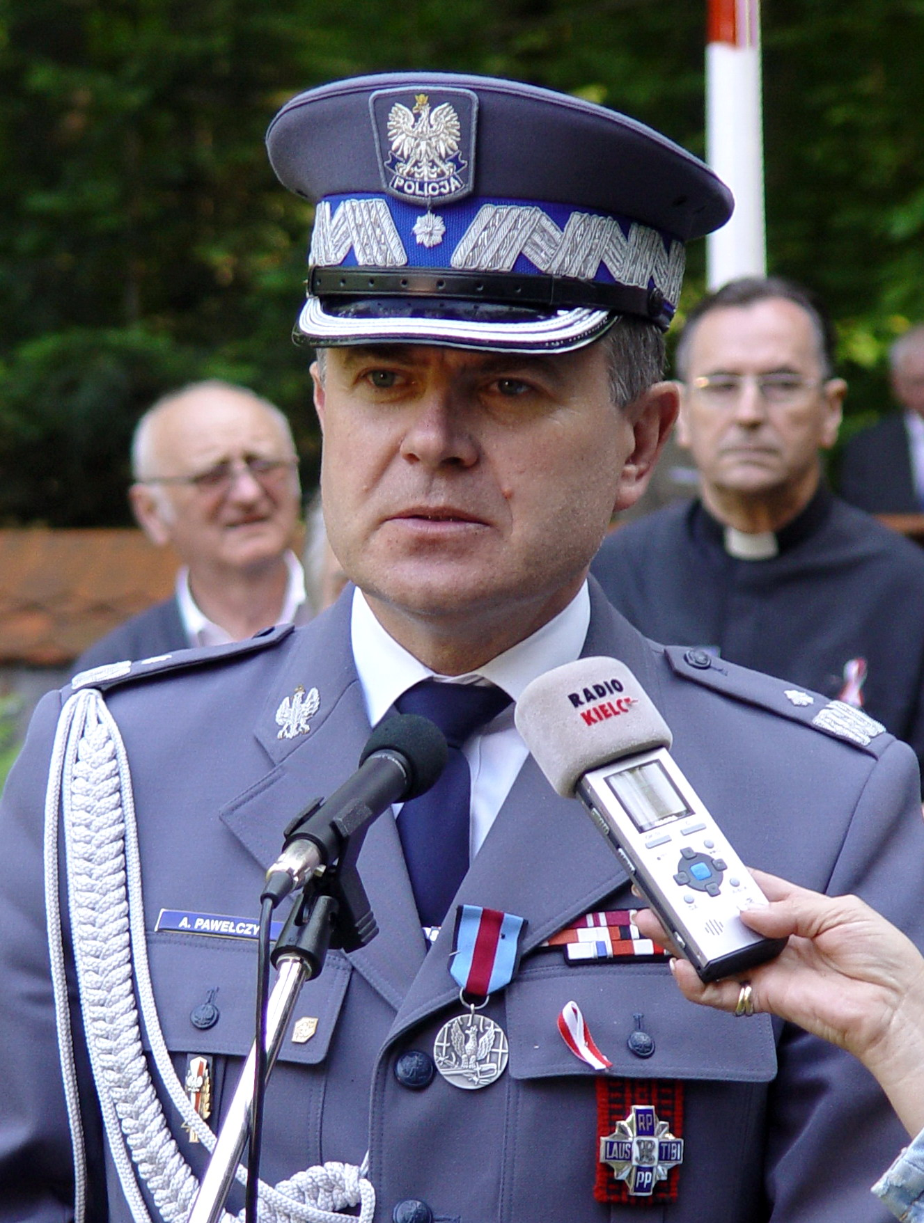 nadinspektor Arkadiusz Pawełczyk, I Zastępca Komendant Głównego Policji